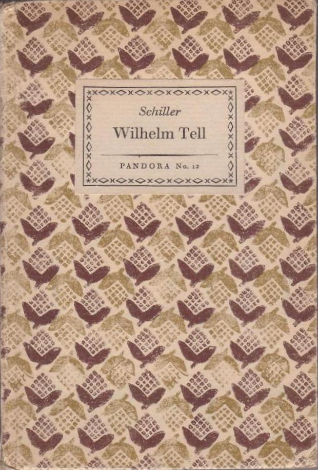 Pandora 12, Wilhelm Tell, Front Cover, Insel Verlag 1920